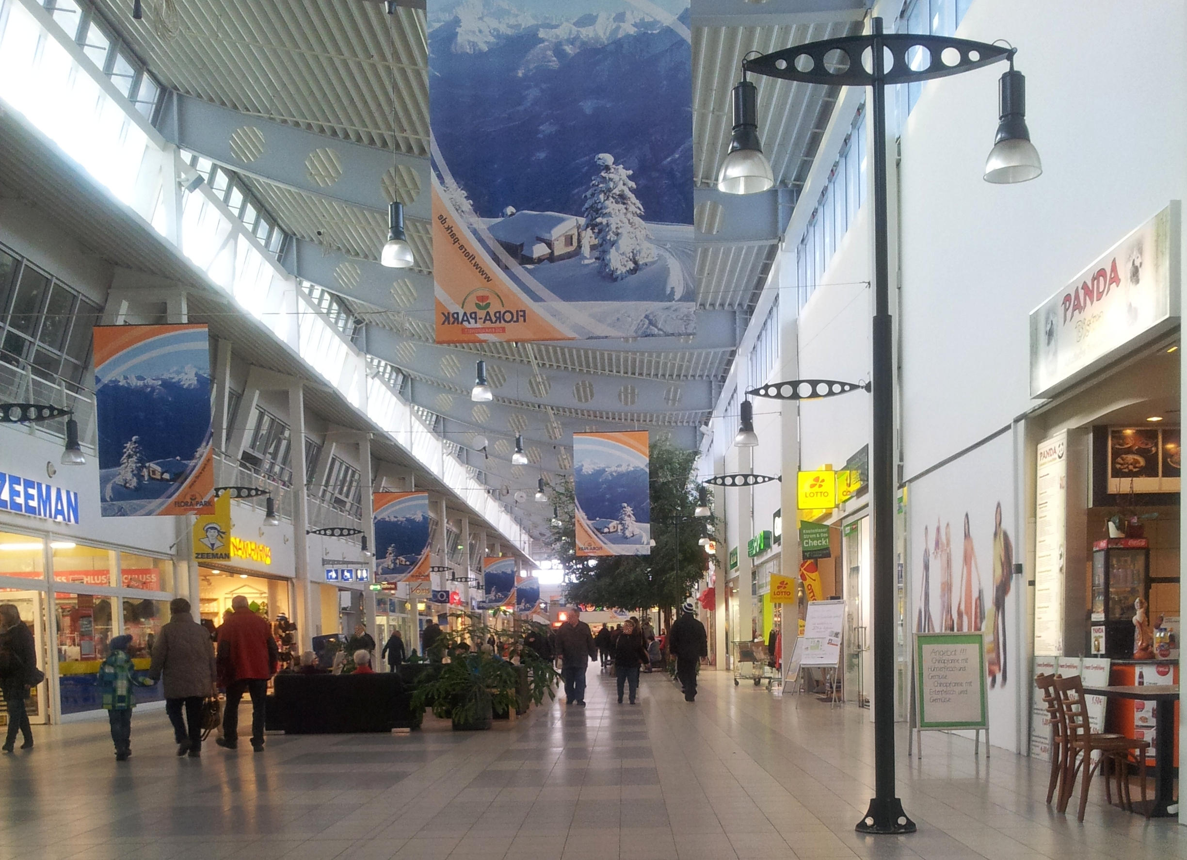 Innenansicht des Florapark Shoppingcenters in Magdeburg